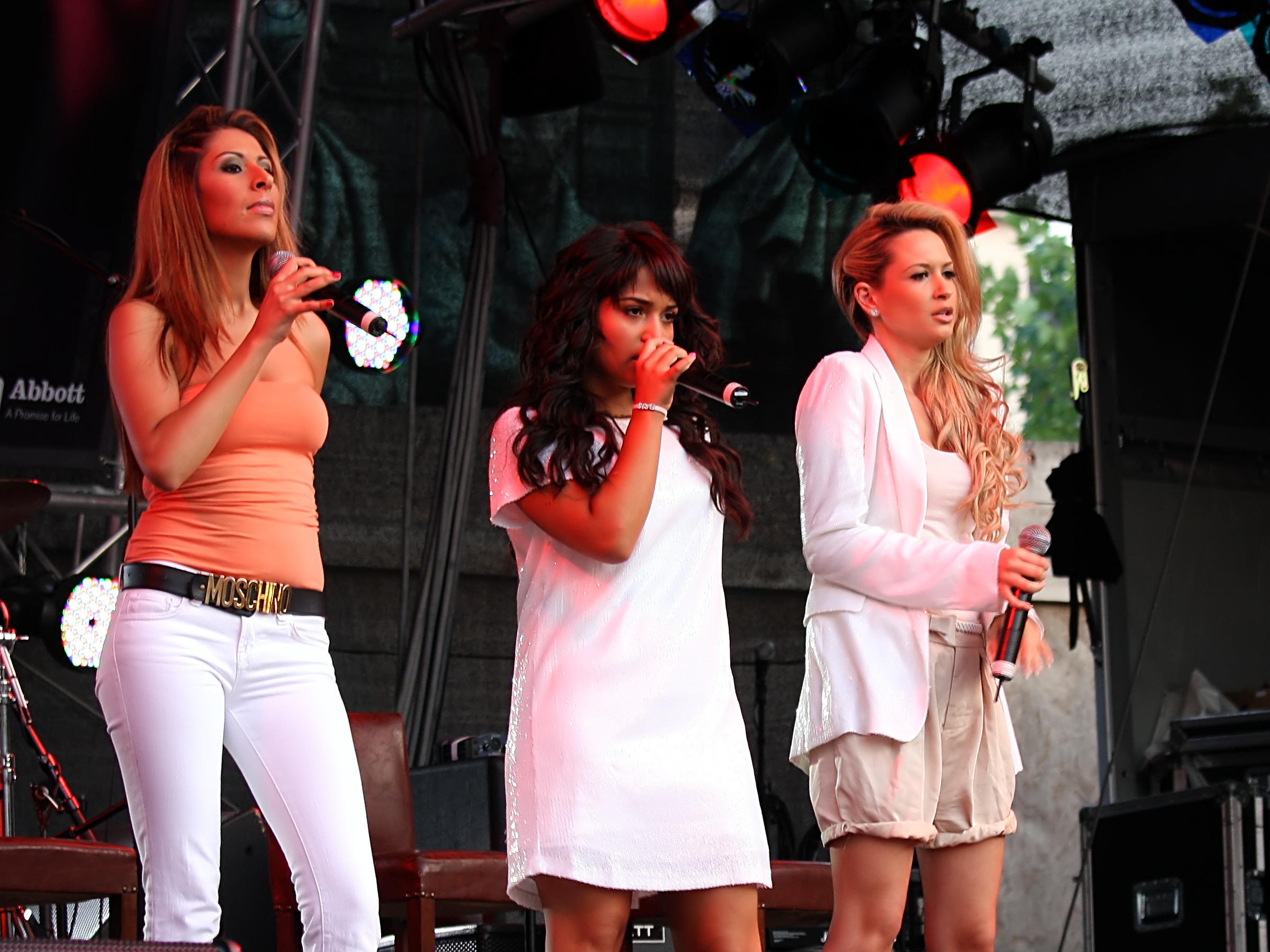 Die Gruppe „Monrose“ - Senna Guemmour, Mandy Capristo, Bahar Kızıl - auf der Hauptbühne auf dem Heumarkt, Köln. Bühnenprogramm zum CSD-Straßenfest/ColognePride 2009.